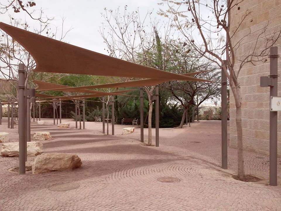 Kampus Uniwersytetu Ben Guriona w Sde Boker